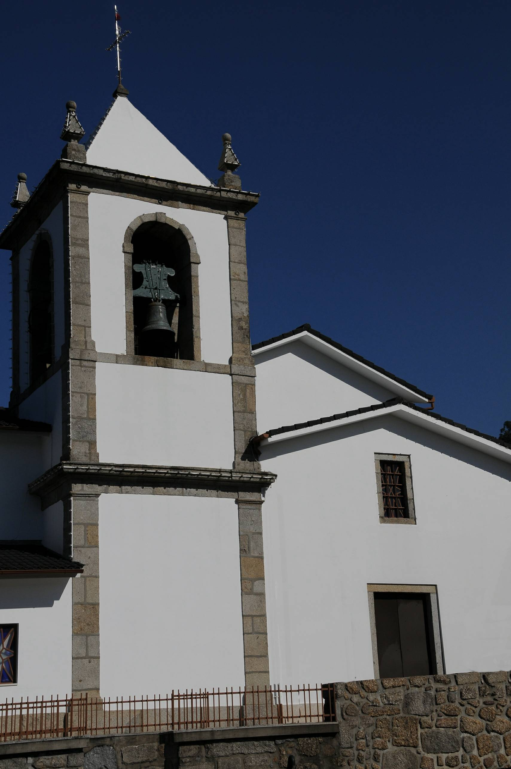 Escudeiros Church, in Braga, Portugal